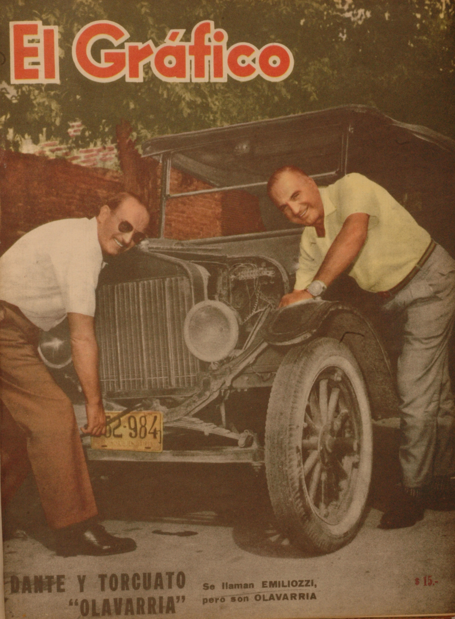 El Grafico del 09 de Enero de 1963. Edicion 2257